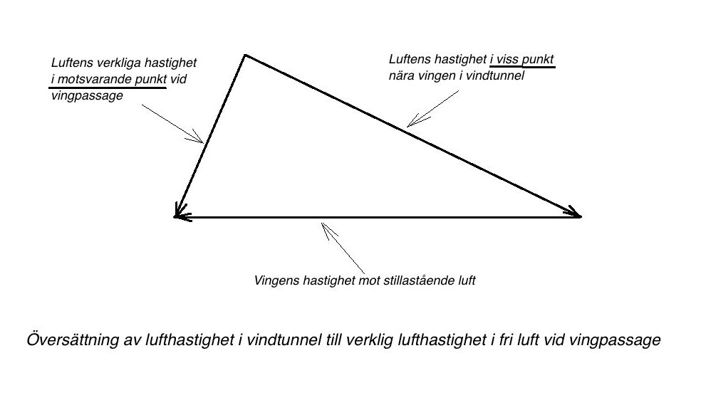 Visar hur man översätter lufthastigheten i en viss punkt nära en vinge i en vindtunnel till verklig lufthastighet i fri luft vid vingpassage